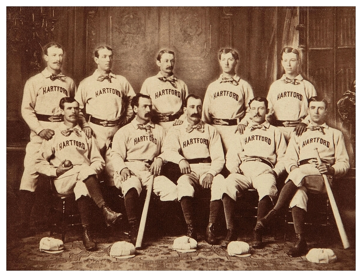 1875 Hartford Dark Blues